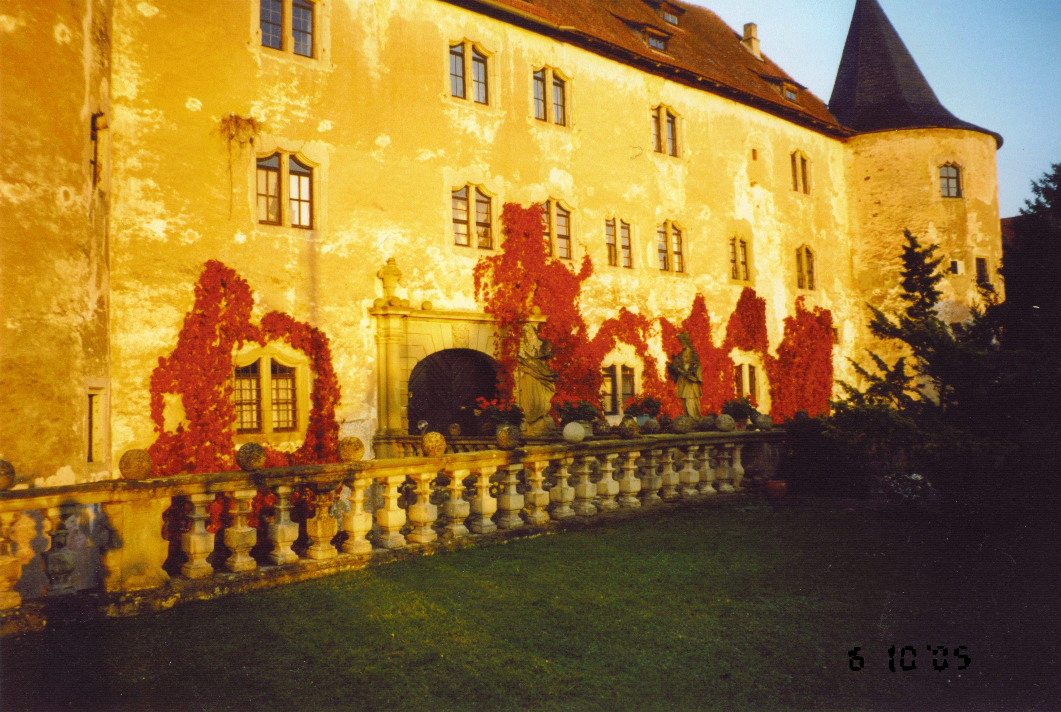 Das Schloss Breitenlohe im Steigerwald